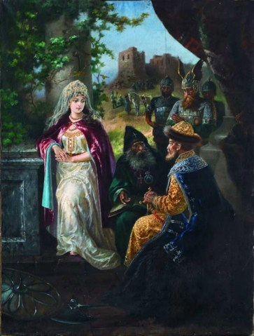 «Ярослав Мудрый и шведская принцесса Ингигерд», конец XIX – начало XX вв. холст, масло; 105,5х80,5